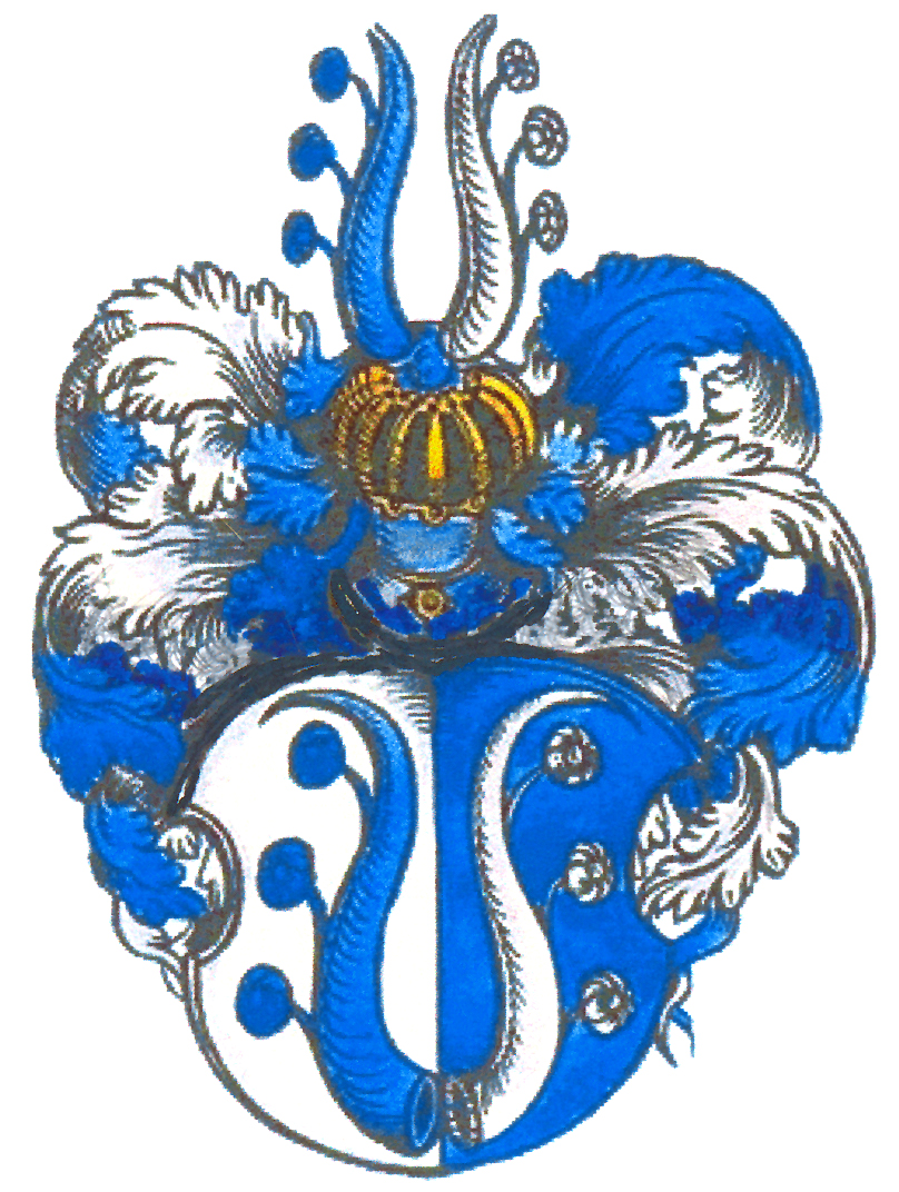 Herb rodu von Gaisruck